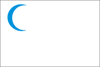 Флаг Хивинского ханства (до 1917 года)